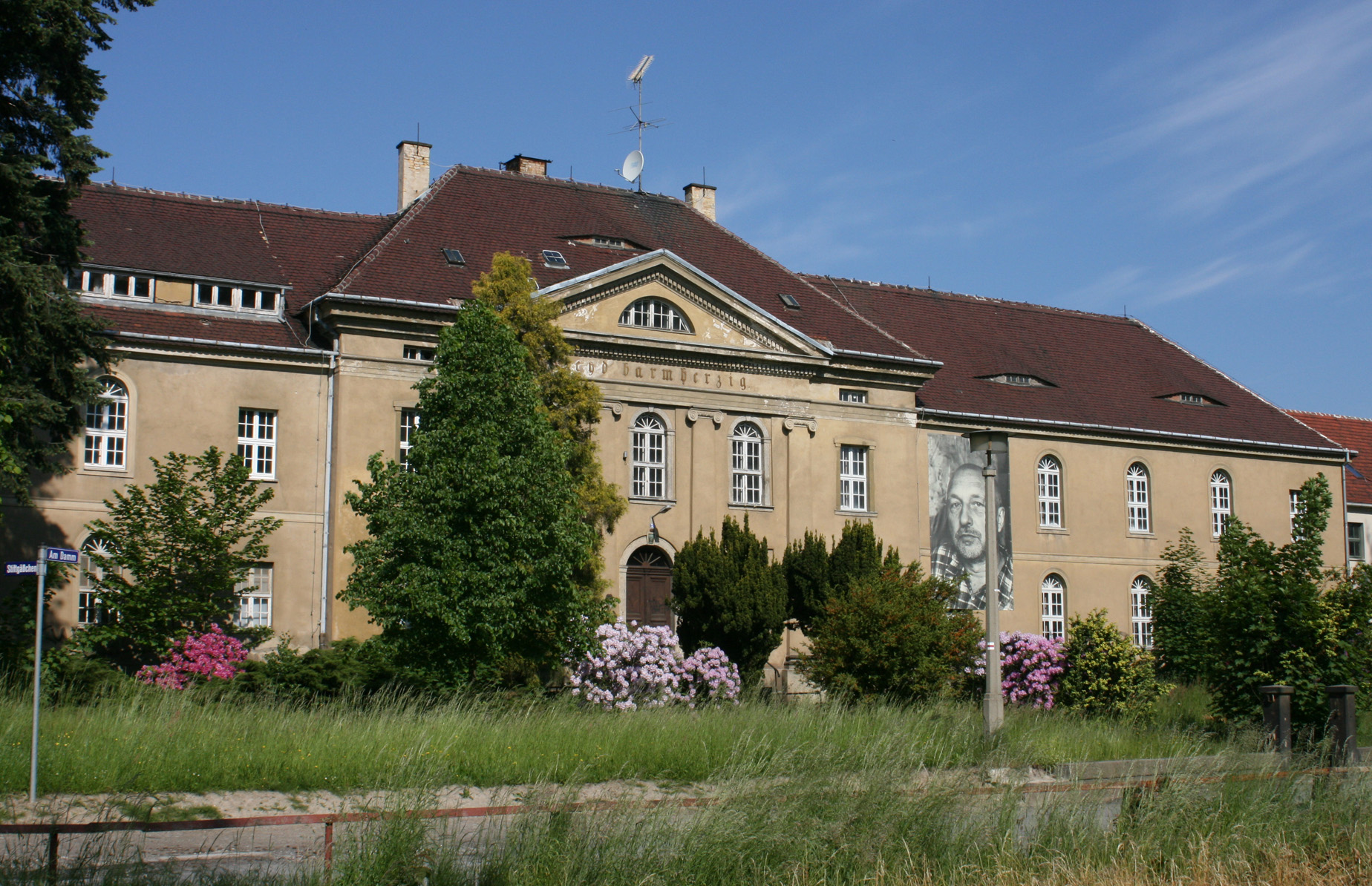 Kamenz Barmherzigkeitsstift (former hospital, founded by Johann Gottfried Bönisch)